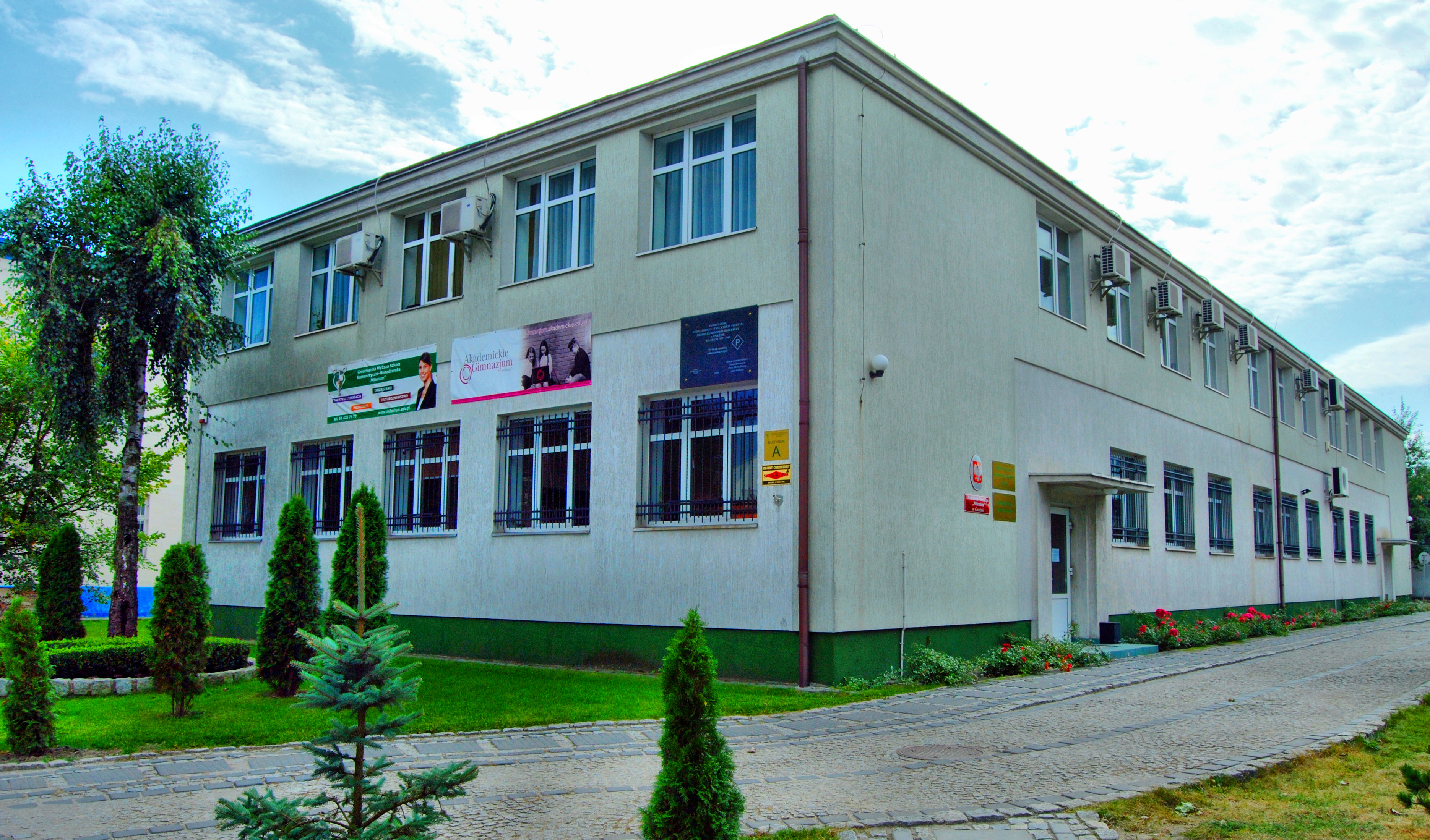 Budynek Gnieźnieńskiej Szkoły Wyższej "Milenium" (dawniej: Gnieźnieńska Wyższa Szkoła Humanistyczno-Menedżerska "Milenium")